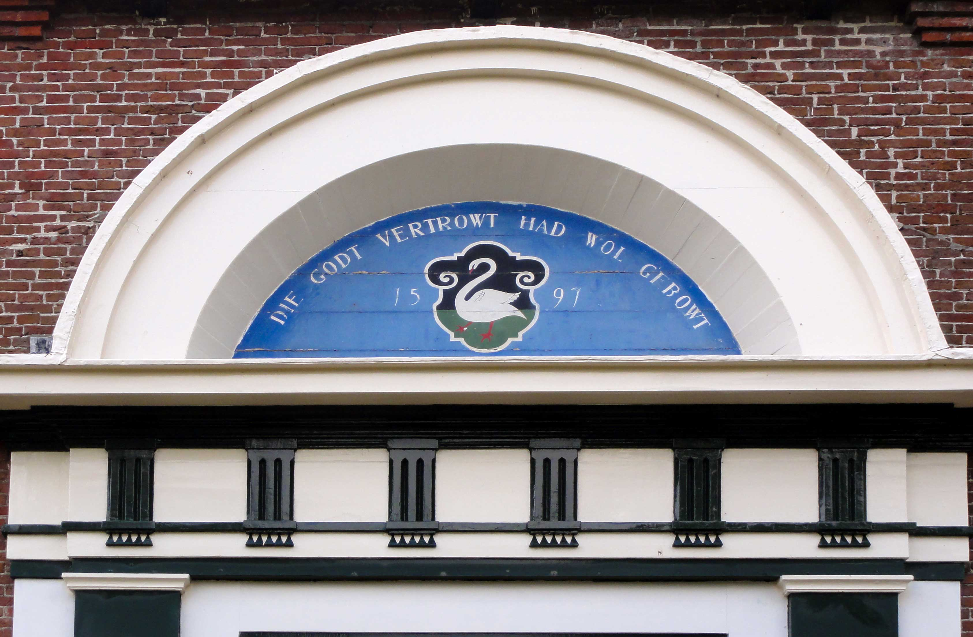 Sint-Lebuïnuskerk van Molkwerum